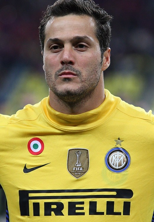 Júlio César Soares Espíndola